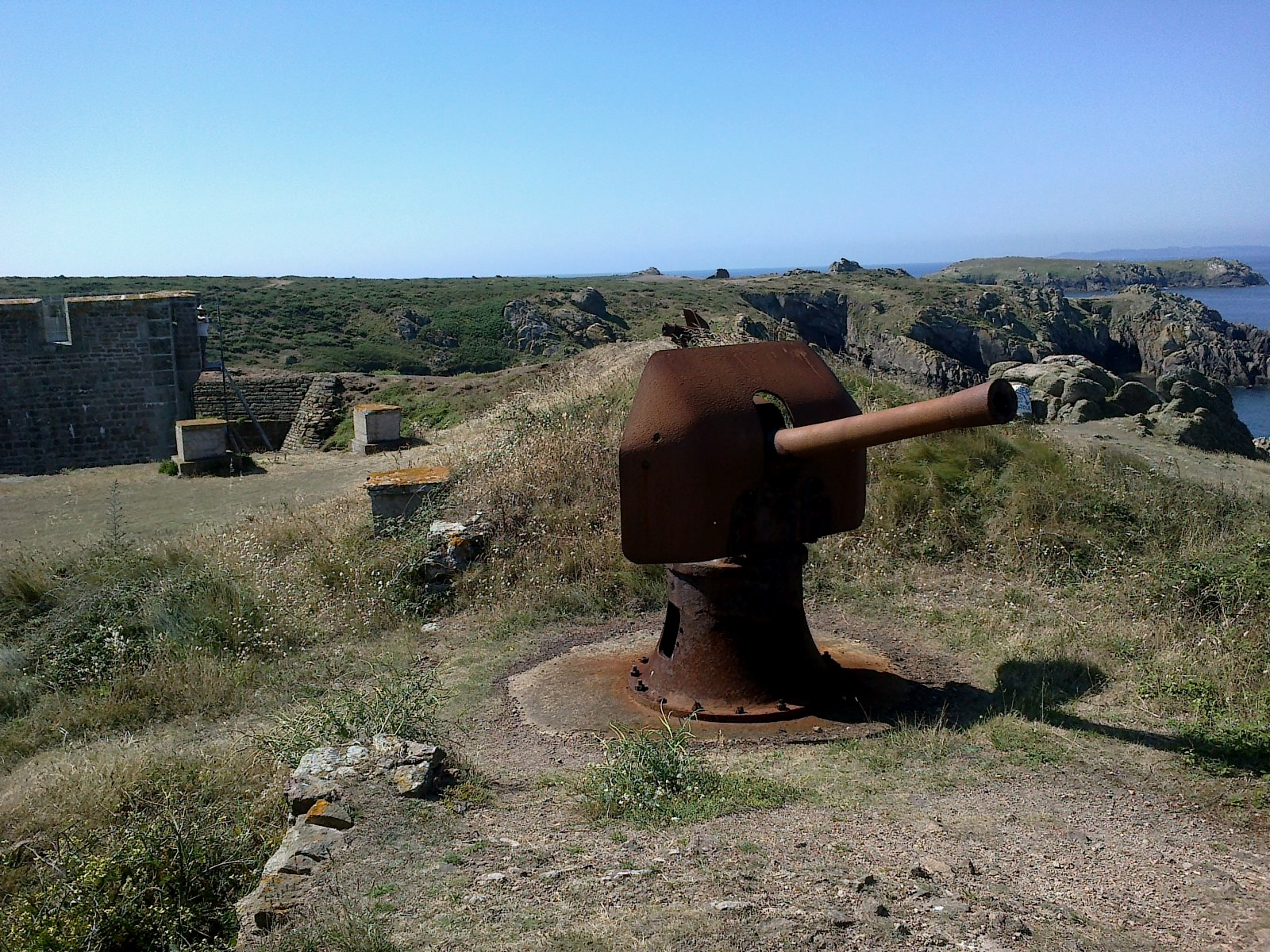 Morbihan Houat Cote Nord-Est Beg Er Vachif Batterie